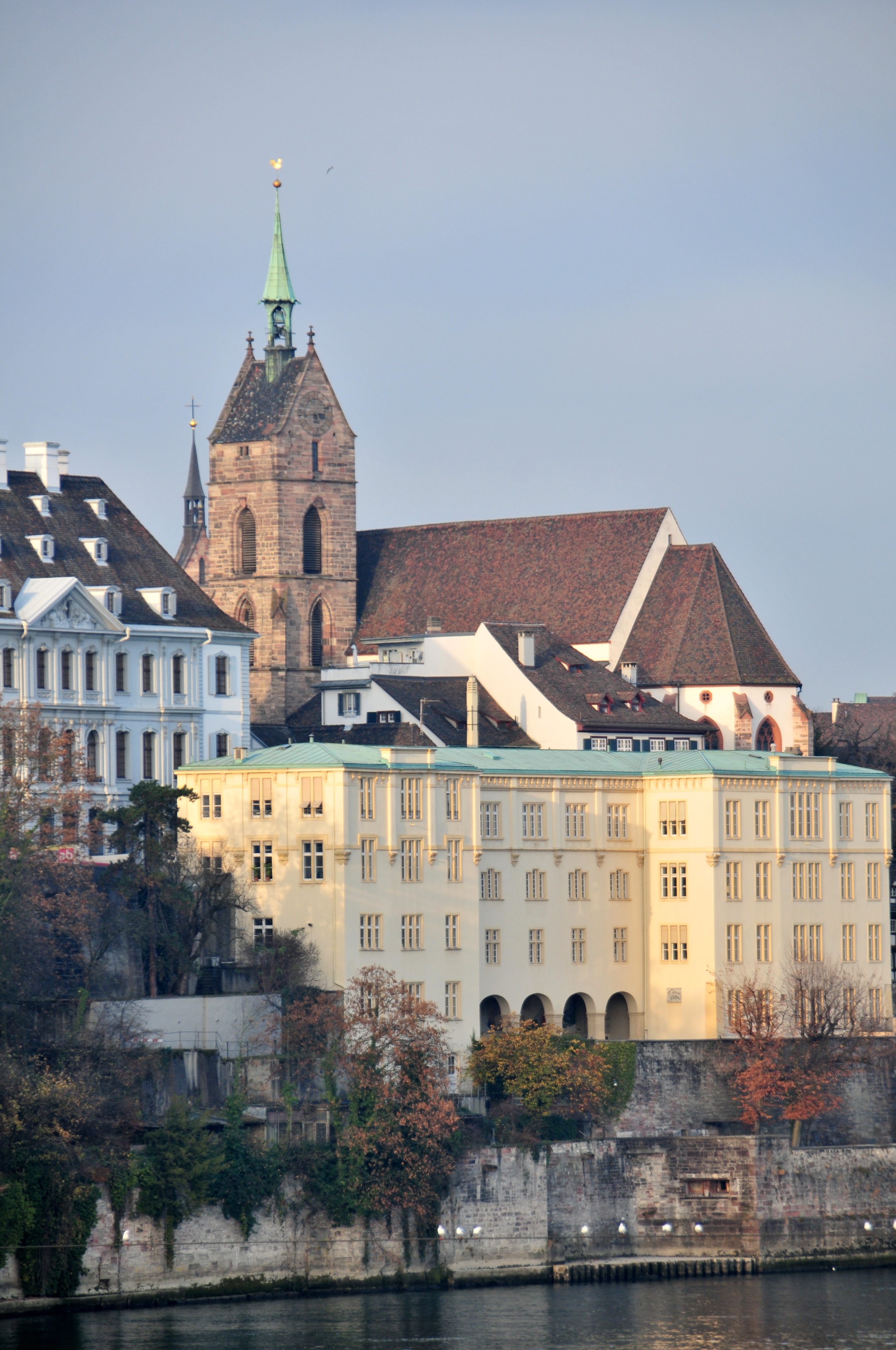 Basel, Altes Universitätsgebäude